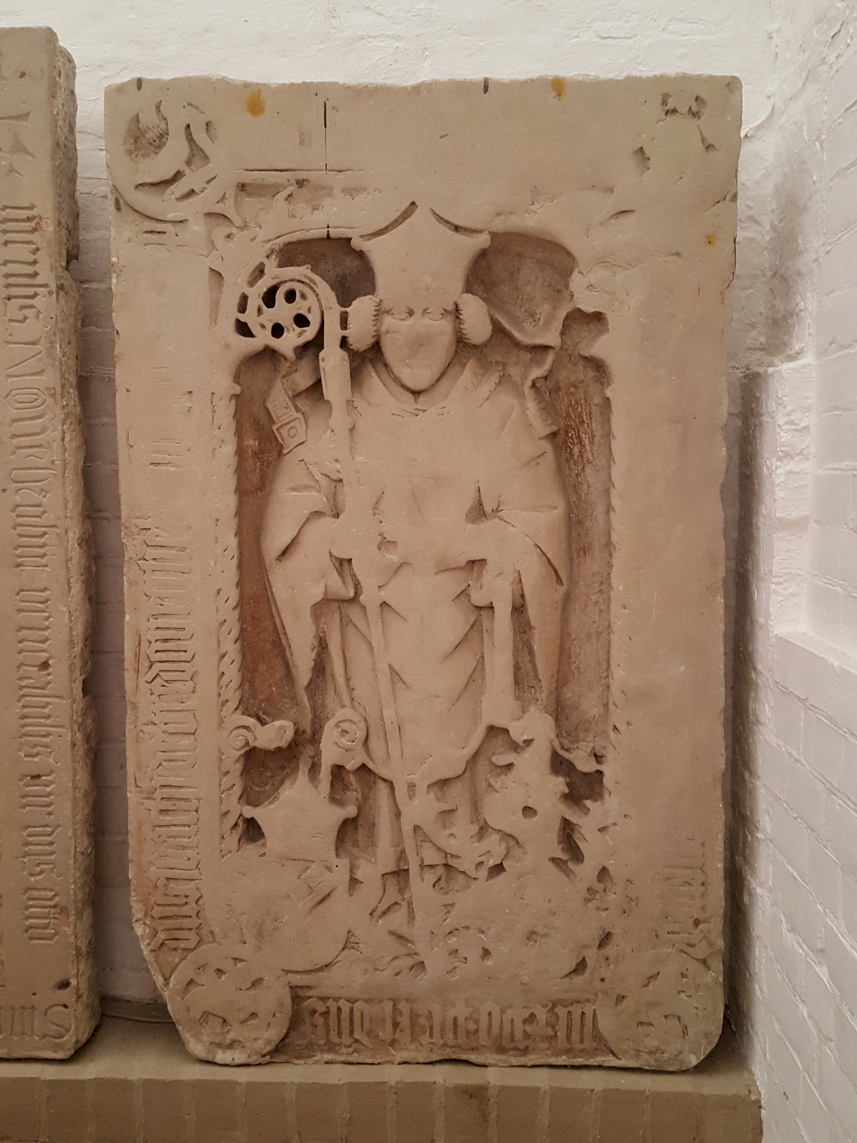 Grabplatte Bischof Joachims von Bredow, Dom zu Brandenburg, Künstler unbekannt